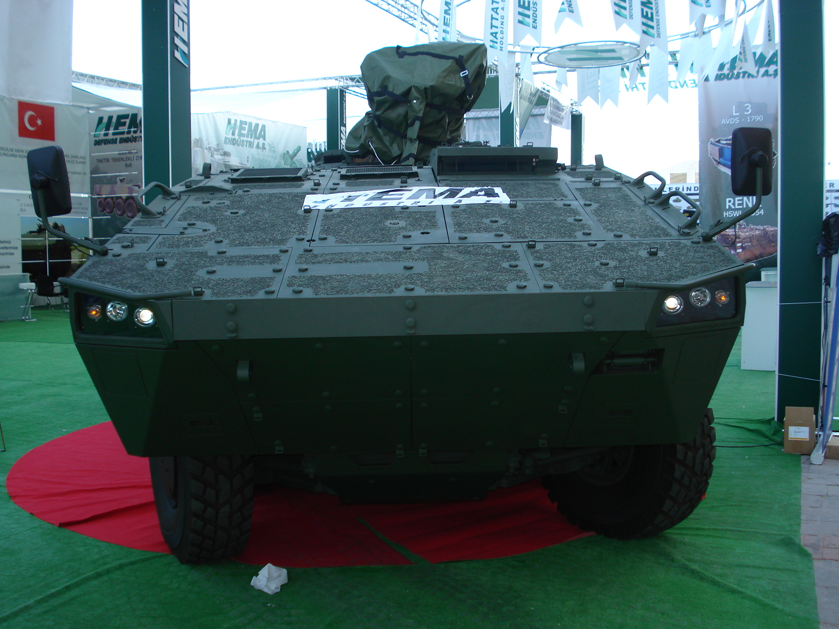 IDEF '07 Savunma Fuarı'nda çekildi.HEMA Patria. 23 Mayıs 2007